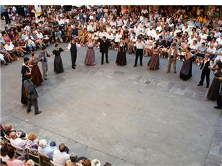 Exemple de contrapàs